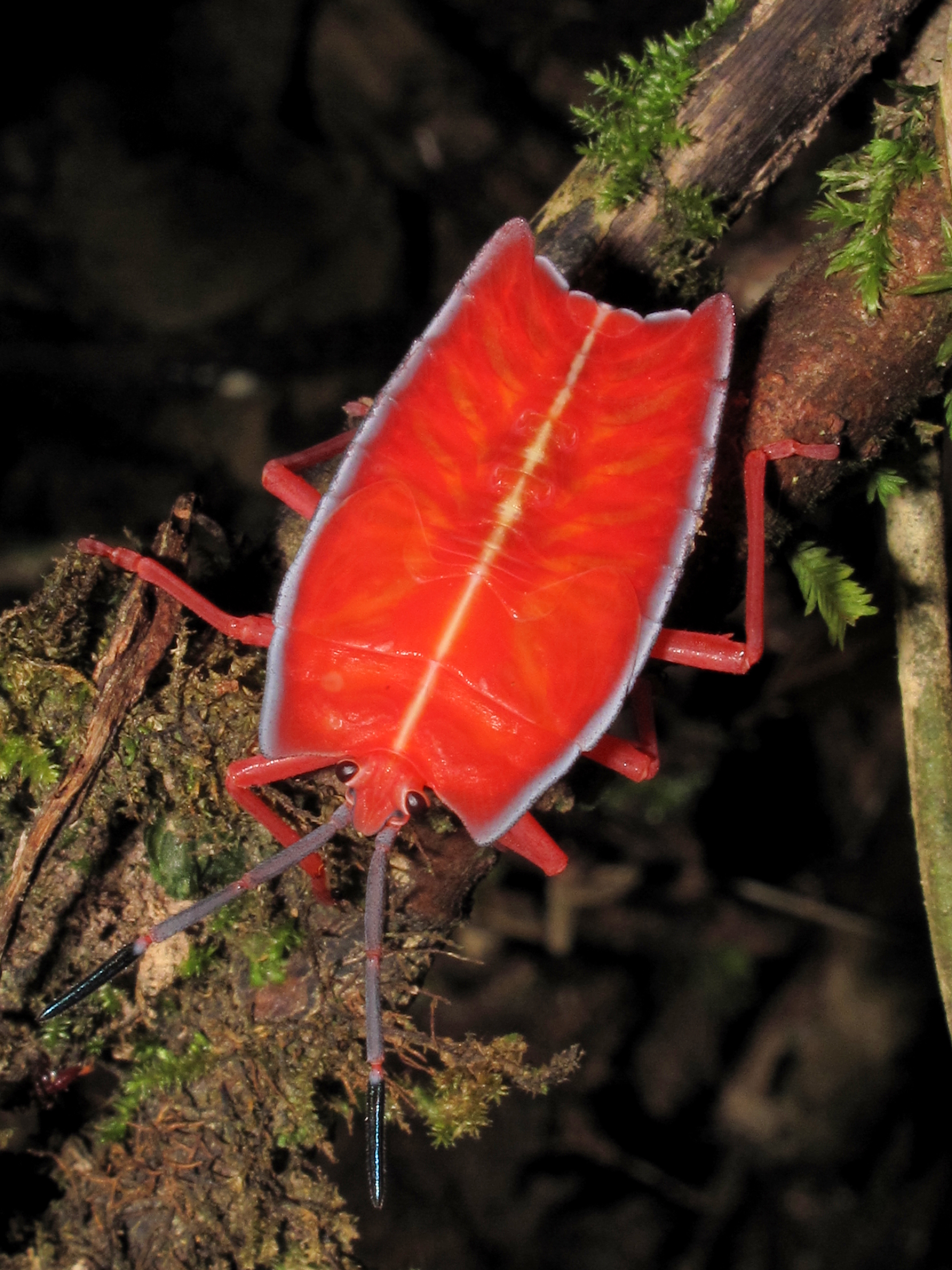 Pycanum rubens (nymph), gunung mulu national park, sarawak, malaysia 2